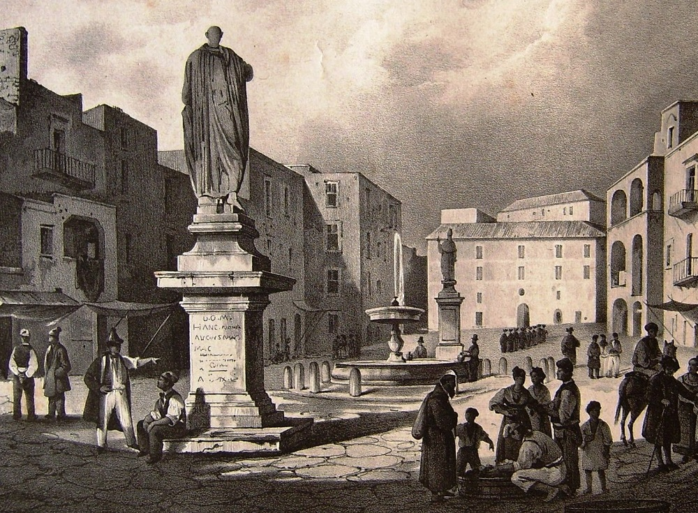 Pozzuoli - L'attuale Piazza della Repubblica con la statua di Quinto Flavio Lolliano Mavorzio (comunemente chiamata Mamozio), e quella del vescovo Martìn de Leòn y Càrdenas con omonima fontana. Autore del disegno sconosciuto (Giacinto Gigante?). Napulitano: Ll'antica chiazza d'ô mercato 'e Pezzulo cu 'e statue d'ô Mamozio e 'e don Martìn de Leòn y Càrdenas.